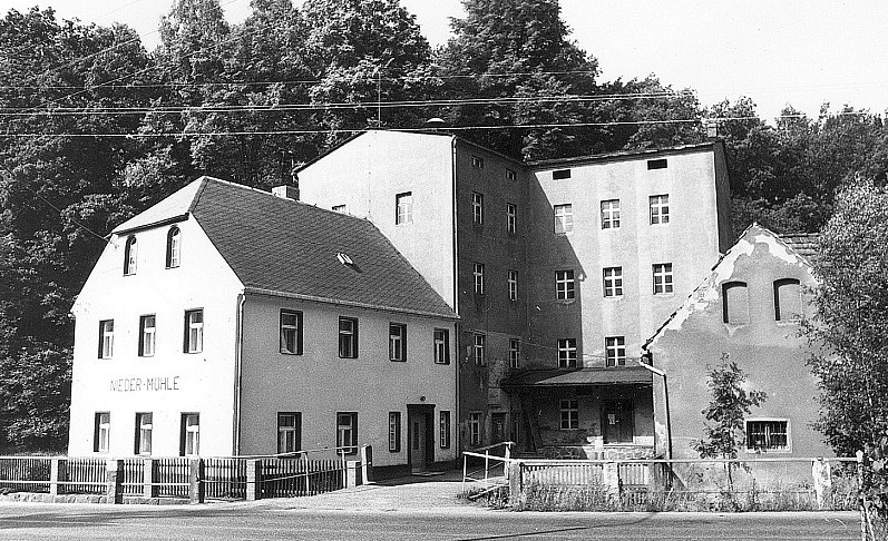 Original image description from the Deutsche Fotothek Bernstadt auf dem Eigen-Kemnitz. Niedermühle